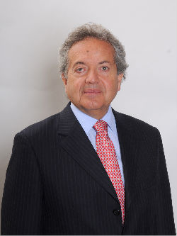 Diputado de la República de Chile, Guillermo Ceroni.